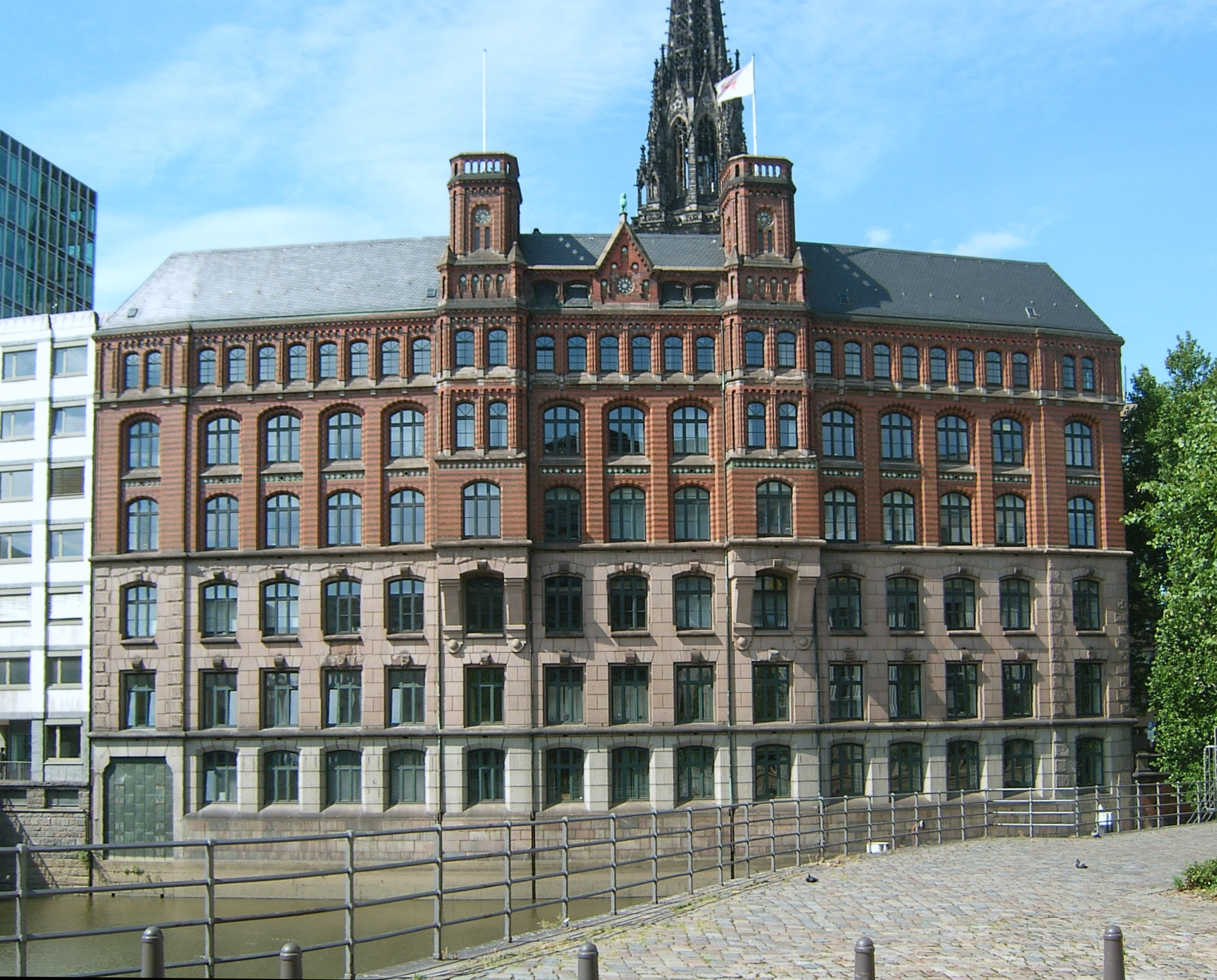 Der Laeiszhof an der Trostbrücke 1 in Hamburg-Altstadt wurde 1897/98 nach Plänen von Hanssen & Meerwein sowie Martin Haller für die Reederei Ferdinand Laeisz erbaut. Der Pudel auf einem der Giebel spielt auf den Spitznamen von Laeisz' Ehefrau und die mit "P" beginnenden Namen der Schiffe (sog. Flying P-Liners) an. This is a photograph of an architectural monument.